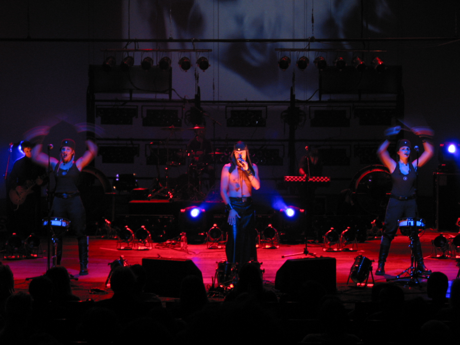 Konzert LAIBACH, WAT-Tour 2003, Volksbühne Berlin